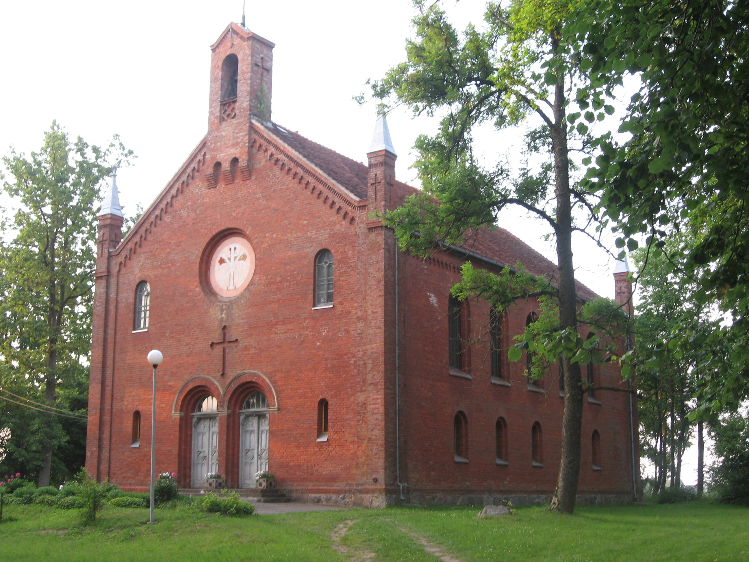 Saugų evangelikų liuteronų bažnyčia